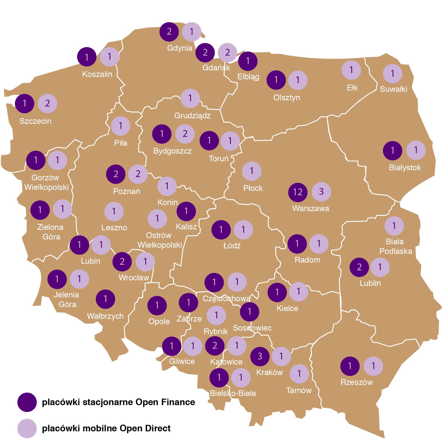 Open Finance - mapa oddziałów w Polsce.